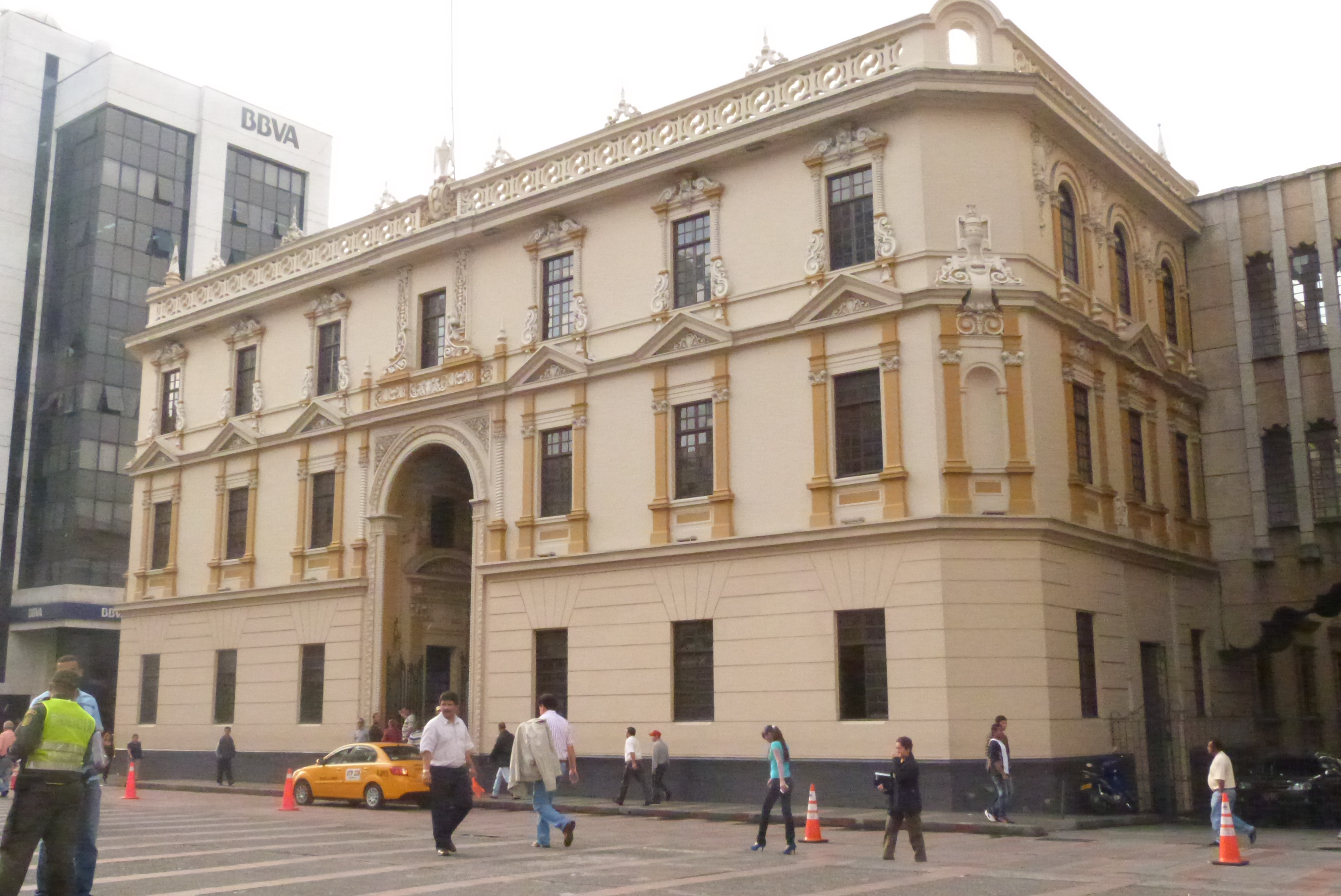 velocidad: 1/800s iso: 1600 diafragma: 8